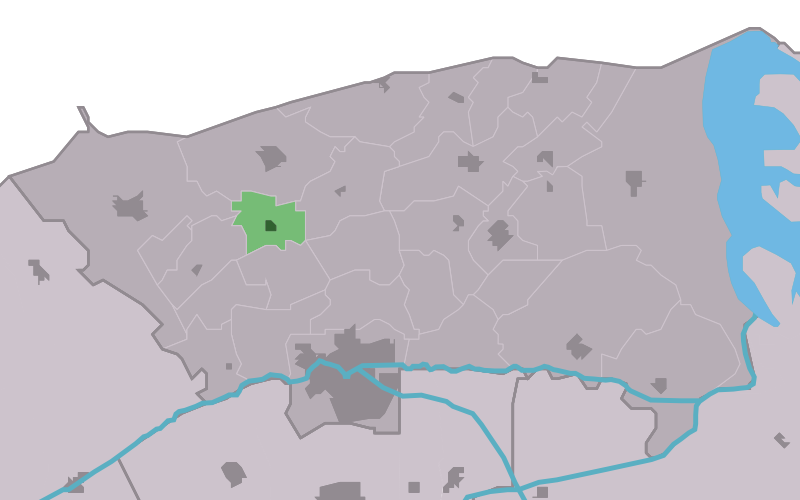 Kaartsje fan himrik fan Hantum